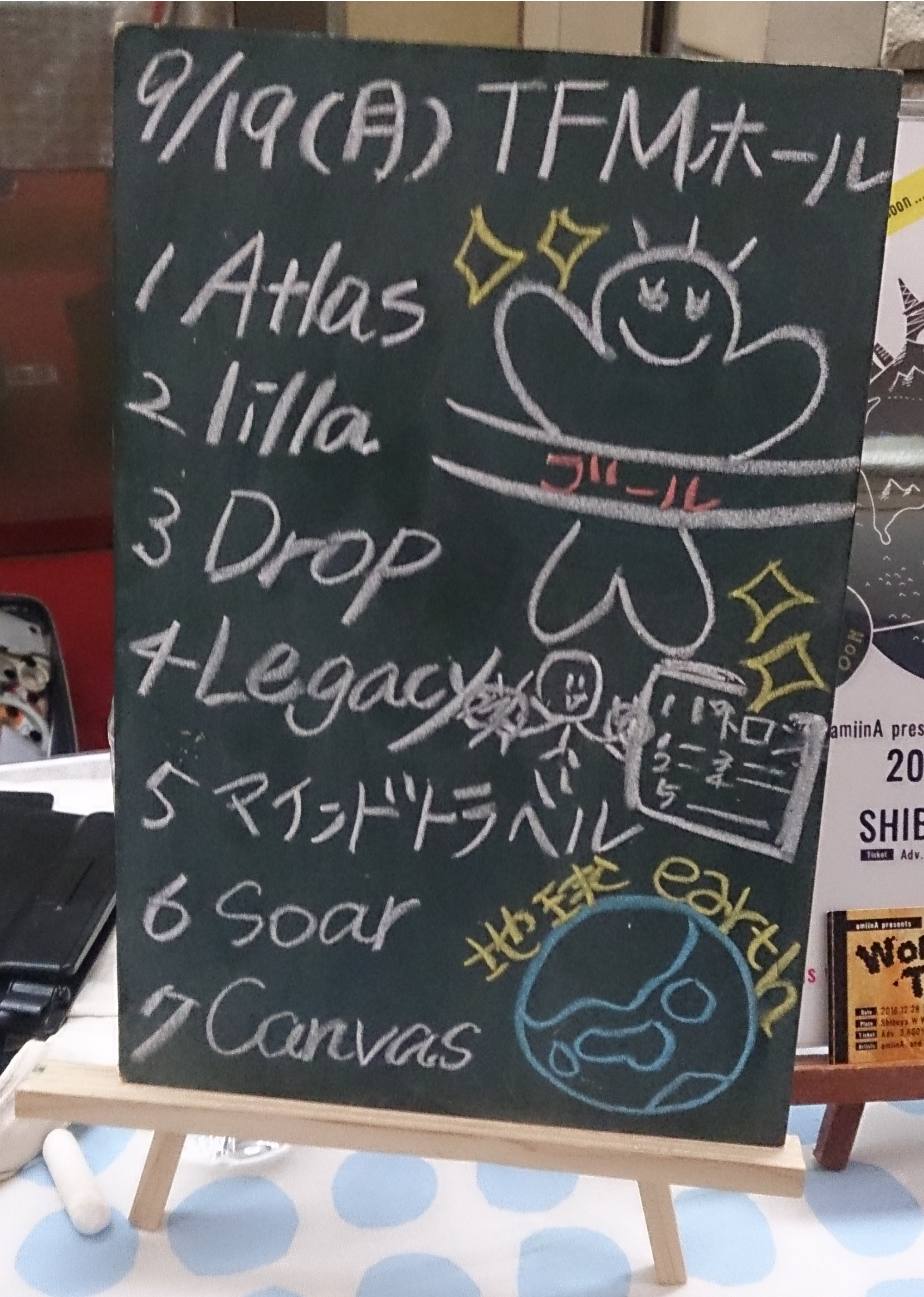 amiinAセトリボード(20160919(1))